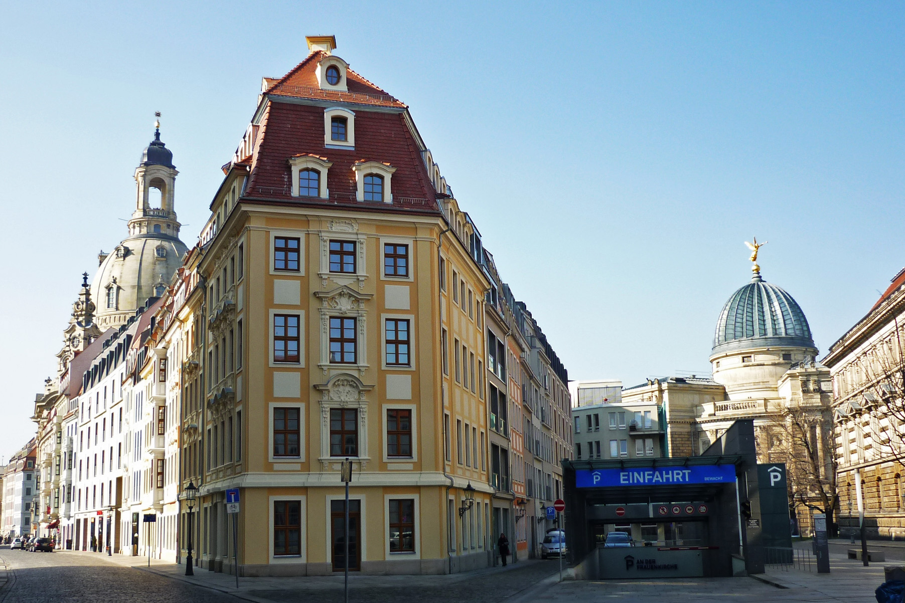 Blick in die Rampische Gasse zur Frauenkirche in Dresden